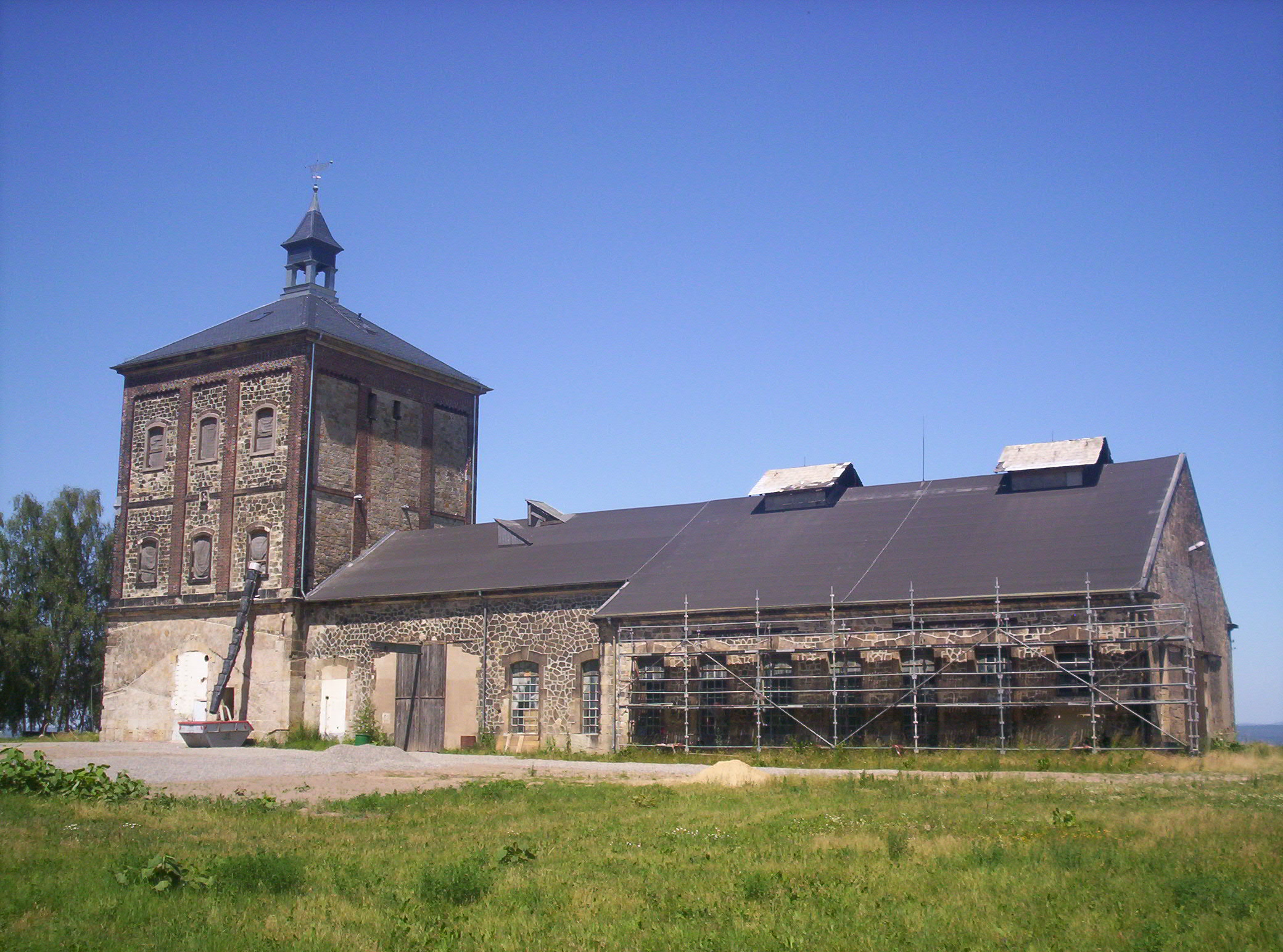 Marienschacht bei Bannewitz mit Malakow-Turm